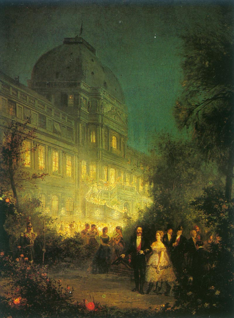 Fête de nuit aux Tuileries, le 10 juin 1867 (fête donnée à l'occasion de la visite des souverains étrangers pour l'exposition de 1867, le Tsar Alexandre II au bras de l'impératrice Eugénie et Napoléon III avec Guillaume Ier de Prusse et le sultan Abdulaziz)